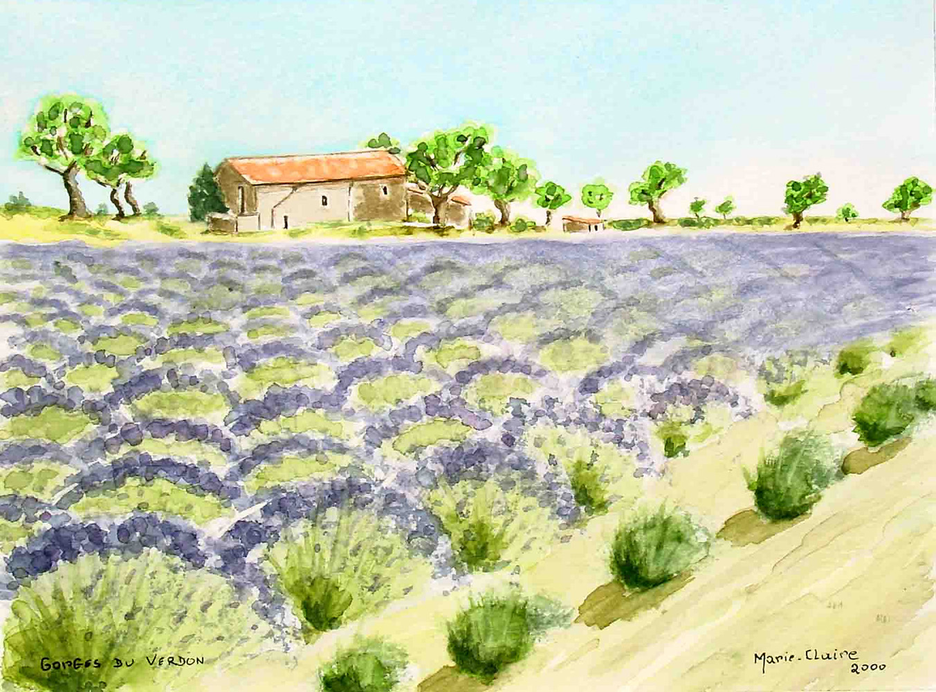 Mayreste (Alpes-de-Haute-Provence), mas des Gorges du Verdon et son champ de lavande.